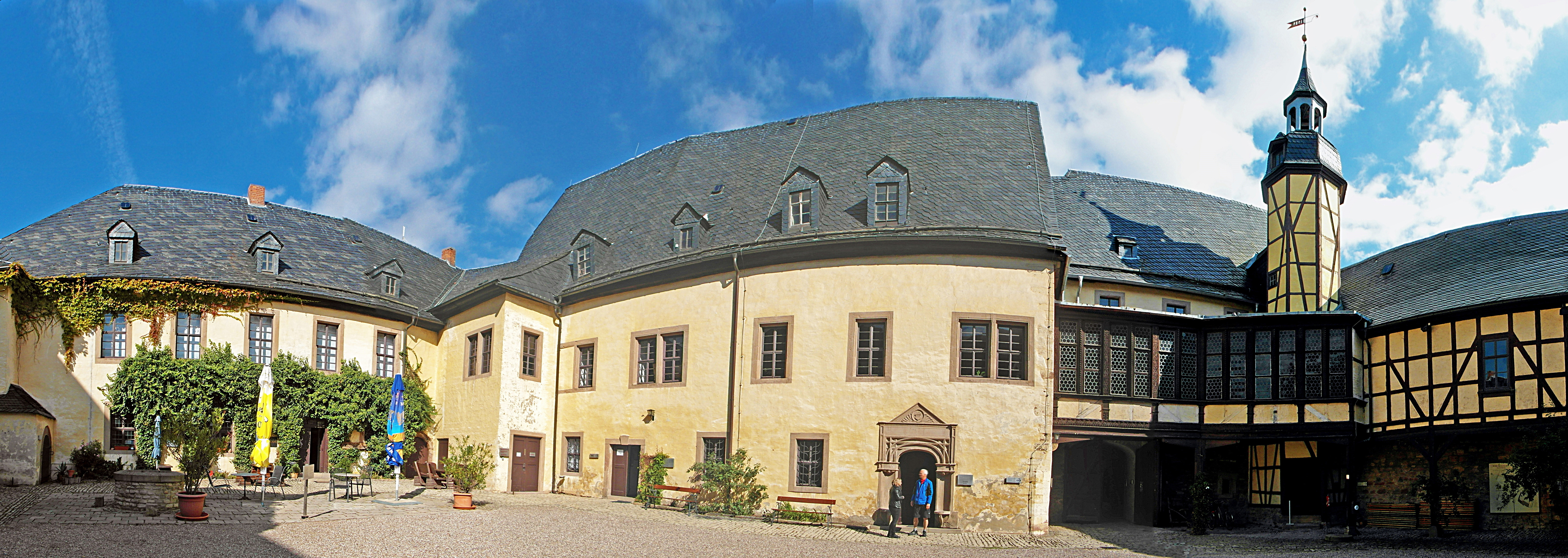 Hof der Kernburg Allstedt mit Schlosscafe